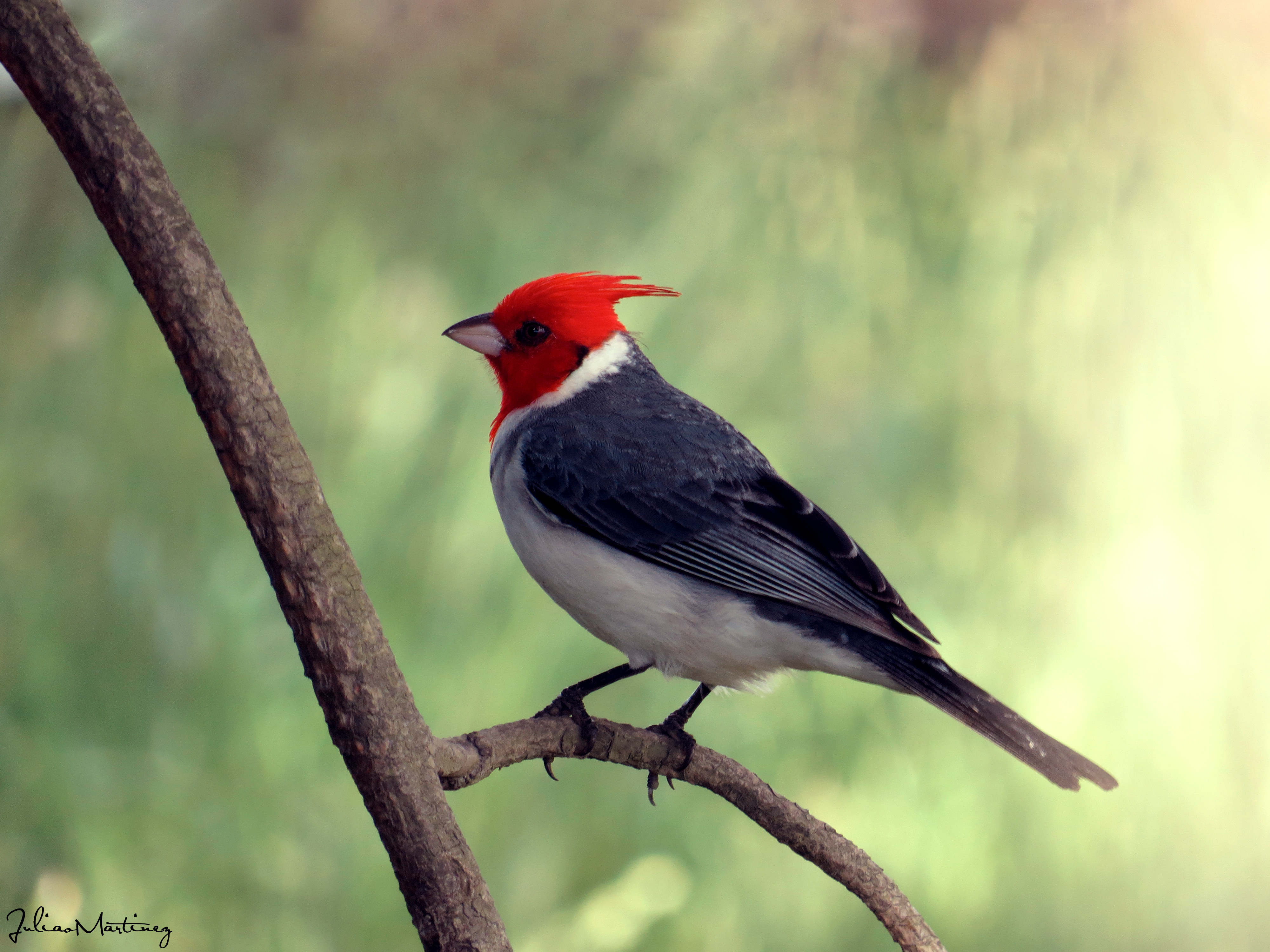 Cardeal